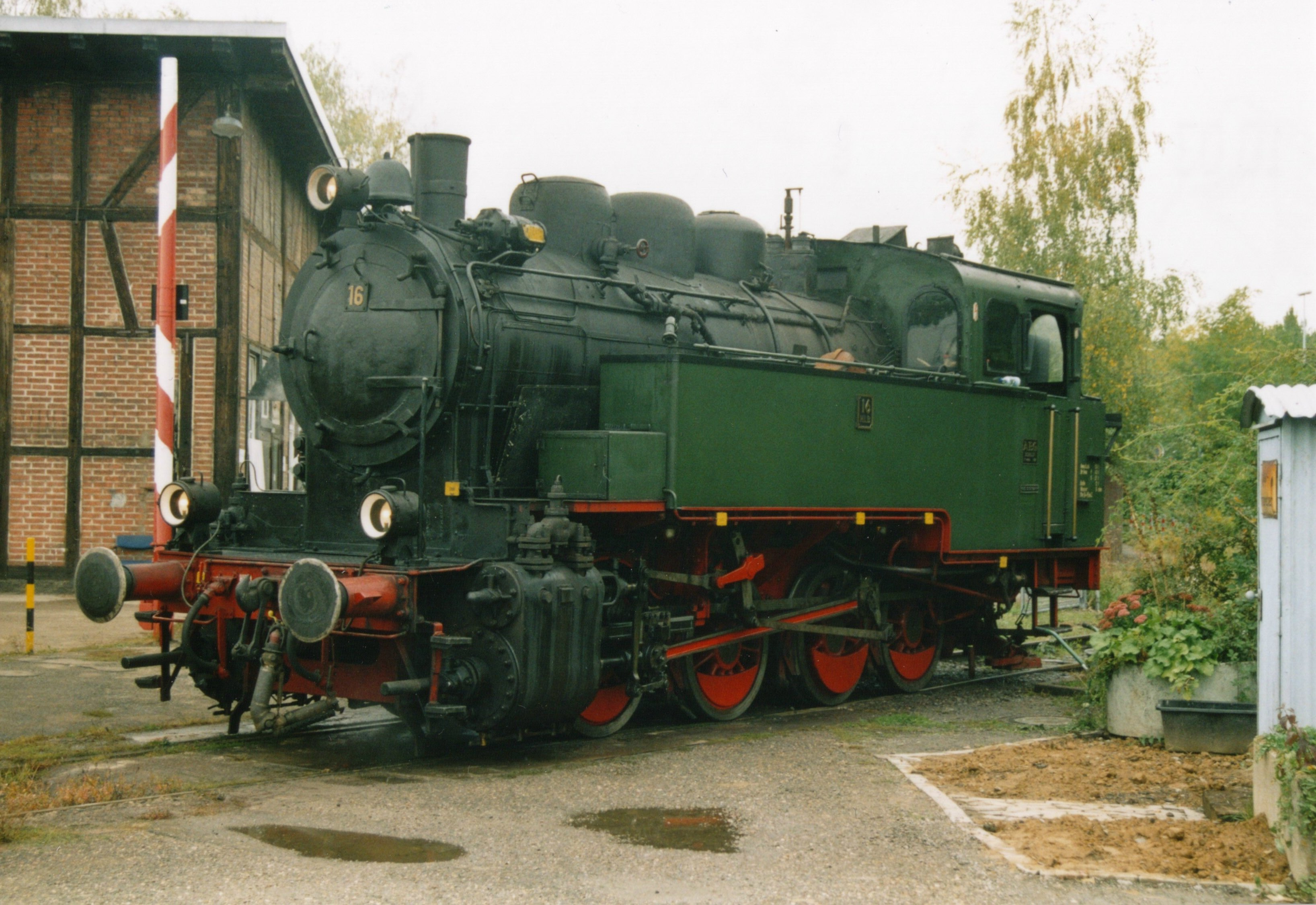 Lok 16 (ehemalige KOE-Nr.11). Das einzige noch vorhandene Triebfahrzeug der Kreis Oldenburger Eisenbahn ist die ehemalige KOE-Nr. 11. Diese Maschine ist heute Museumslok bei der GES e.V. und trägt die Nr. 16. Baujahr 1928 von der AEG in Hennigsdorf bei Berlin. (GES e.V. Gesellschaft zur Erhaltung von Schienenfahrzeugen, Stuttgart) Foto: Bahnbetriebswerk Heilbronn Oktober 2003 by Heiszdampflok